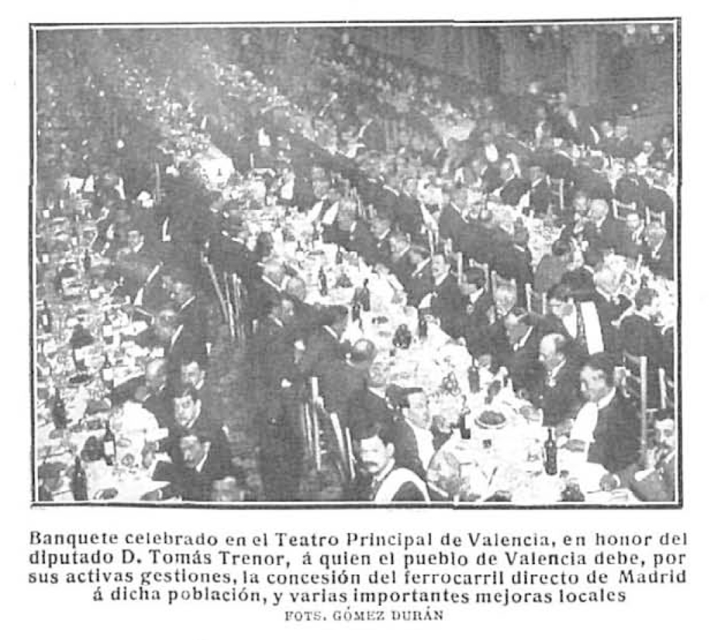 Banquete celebrado en el Teatro Principal de Valencia.